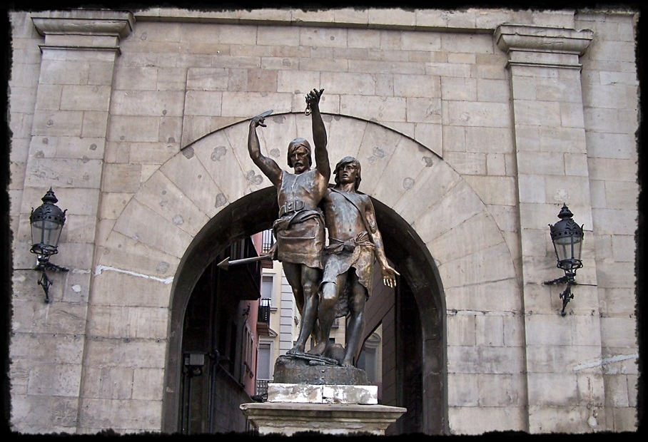 Monumento de los libertadores de la ciudad Indivil i Mandoni